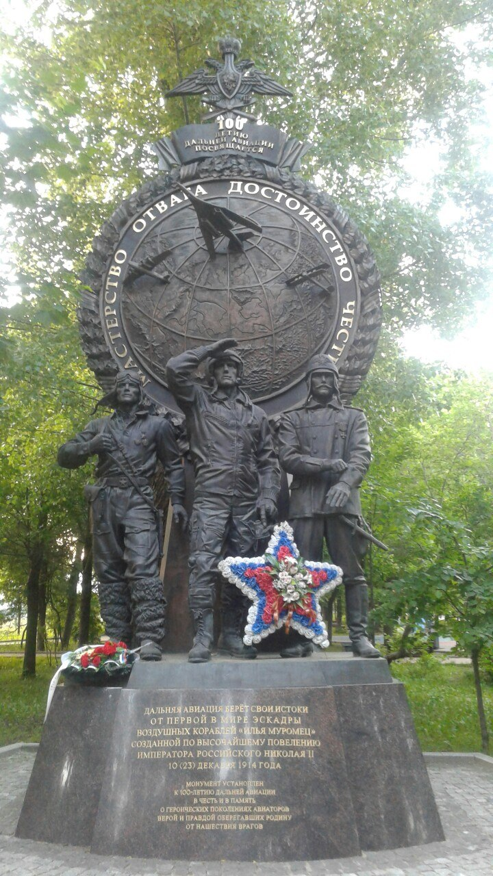 Памятник Дальней авиации России в Москве, в сквере Девичьего поля